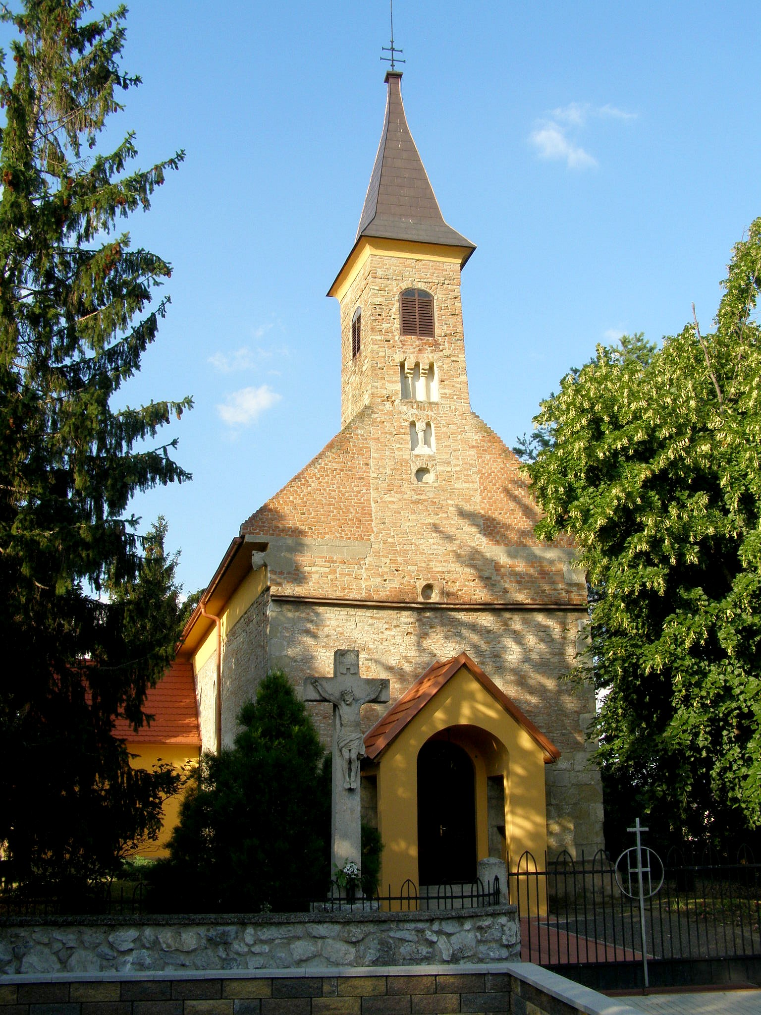 Priečelie románskeho kostola Nanebovzatia Panny Márie v Boldogu